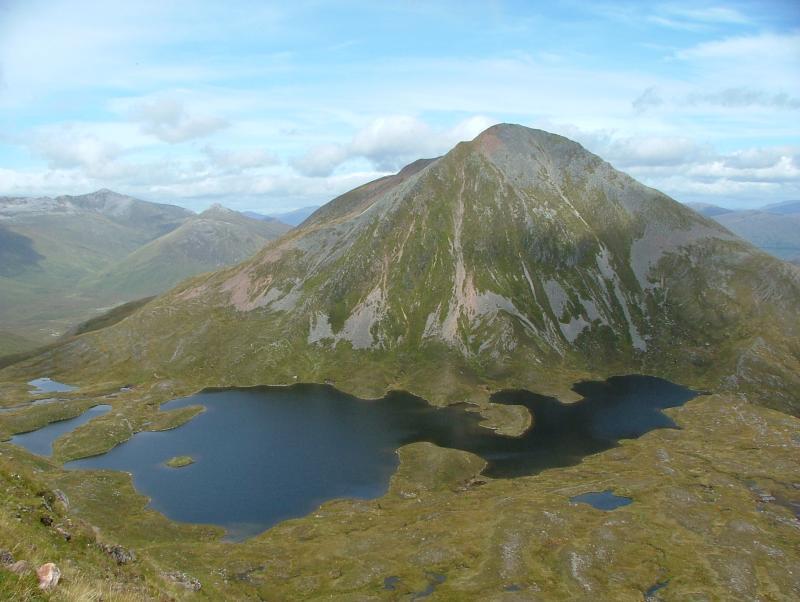 Sgurr Eilde Mòr from Sgòr Eilde Beag